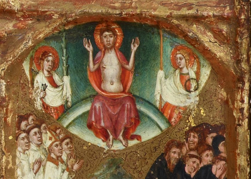 Detall de l'escena Maiestas Domini